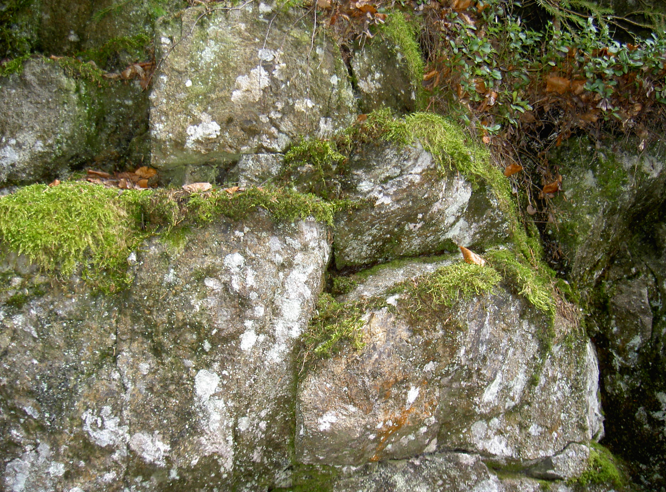 Lenkenhammerfels